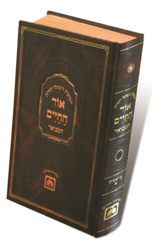 אור החיים המבואר עוז והדר